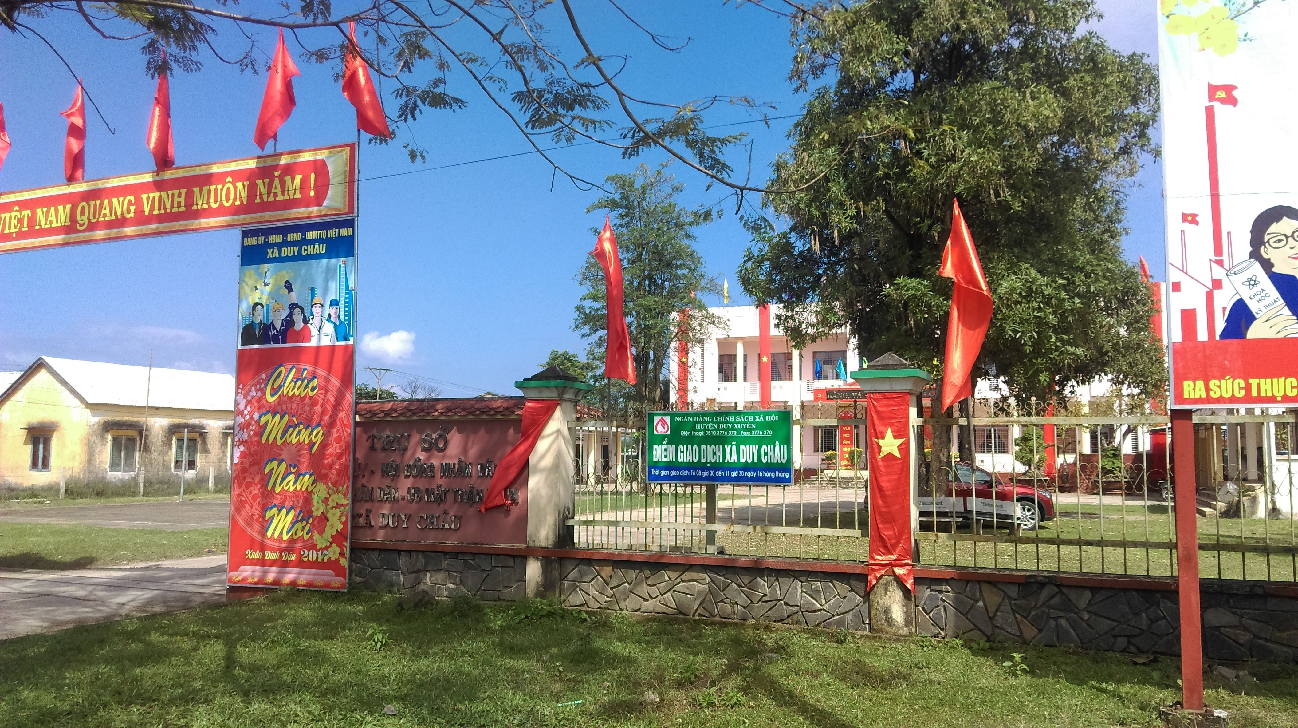 UBND xã Duy Châu, Duy Xuyên, Quảng Nam